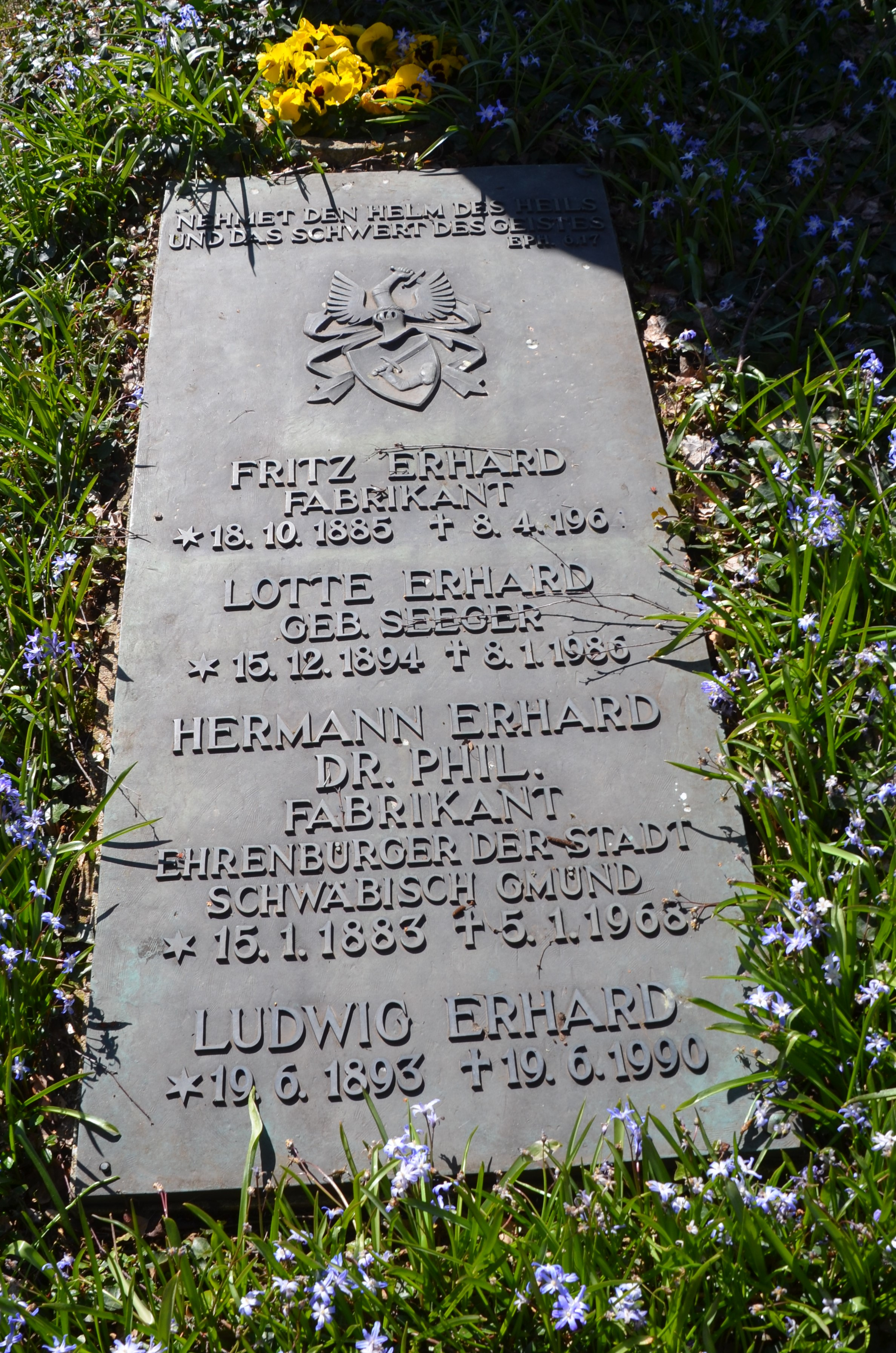 Familiengrab der Fabrikanten Familie Erhard auf dem Leonhardsfriedhof Schwäbisch Gmünd - Detail